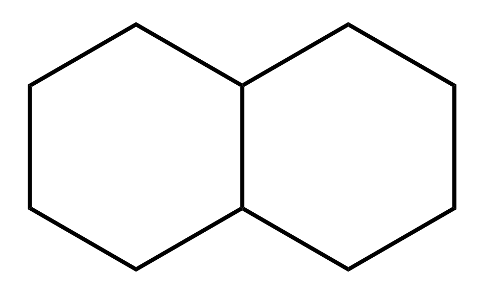 Decaline